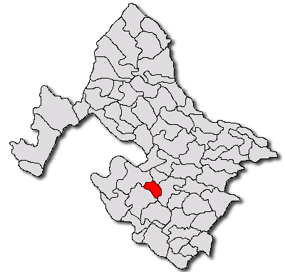 Categorie:Hărţi ale judeţului Mehedinţi